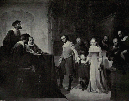 After a poem by Hendrik Tollens.